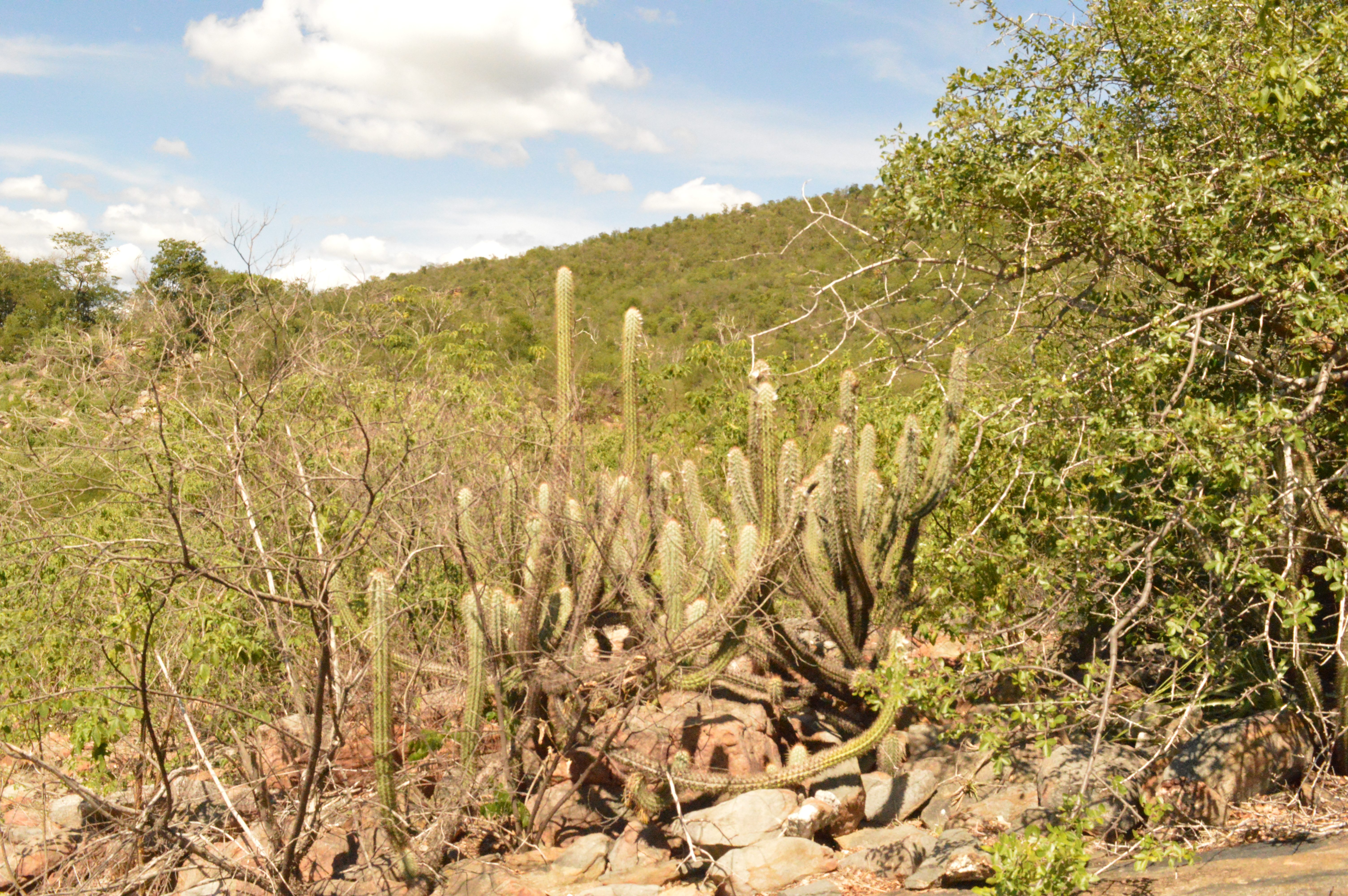 Matas e vegetação do povoado Boqueirão de Regino, localizado na cidade de Paratinga. Foto de 19 de janeiro de 2017.